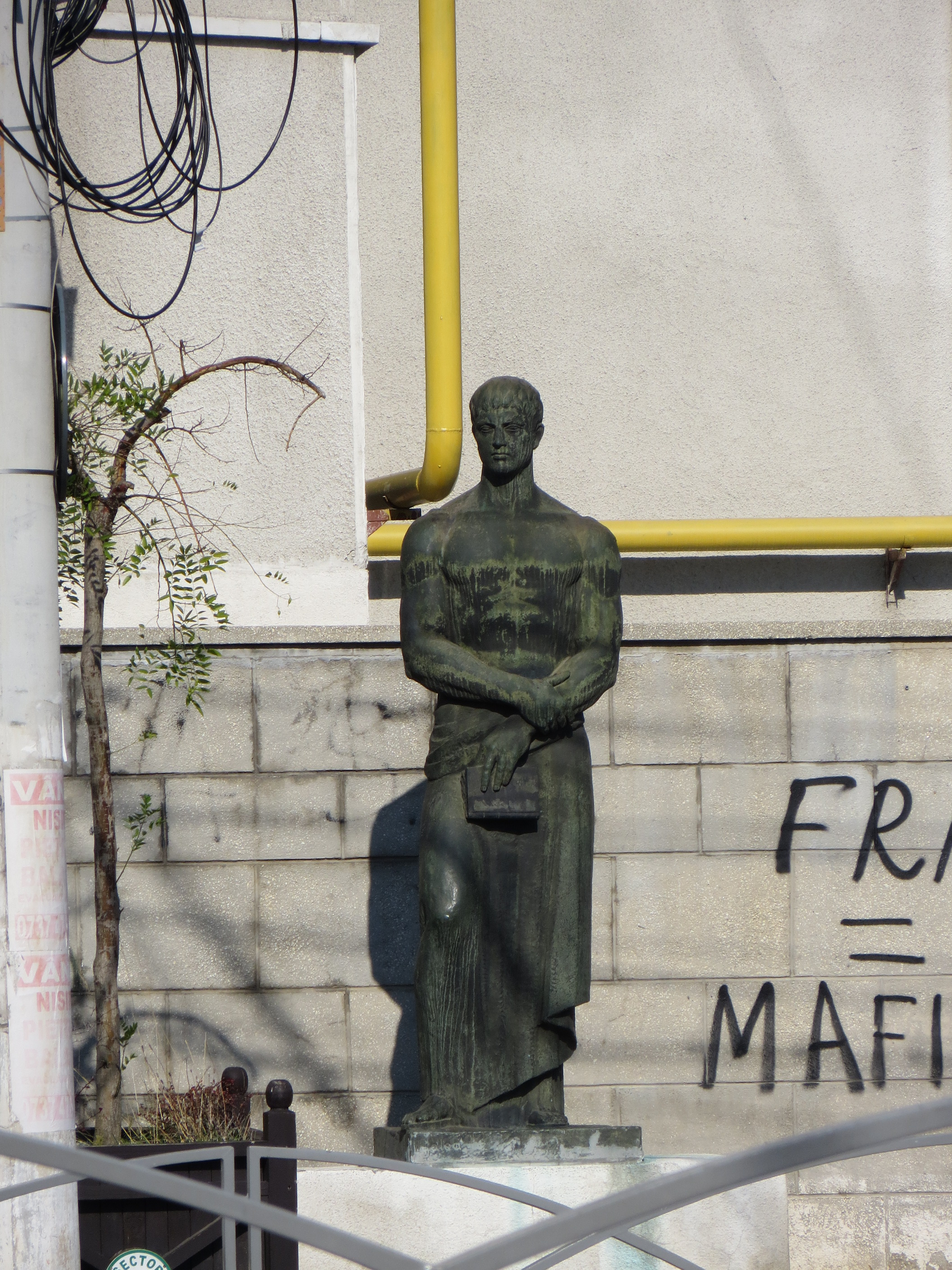 Două statui "Muncitori"